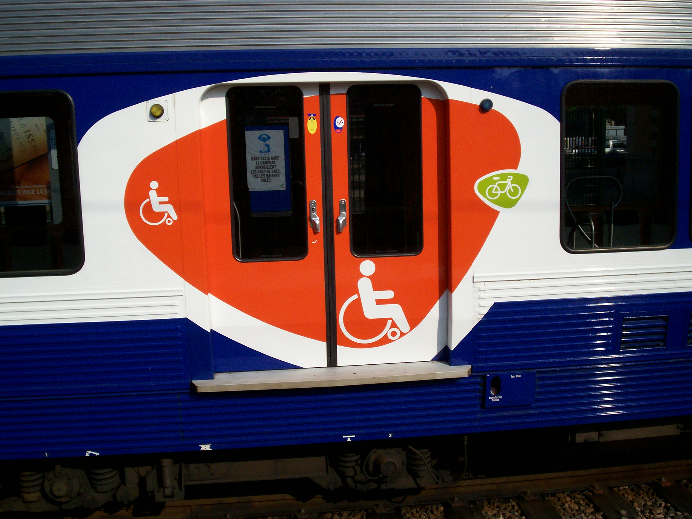 Porte orange UFR d'une rame Z6400 GCO